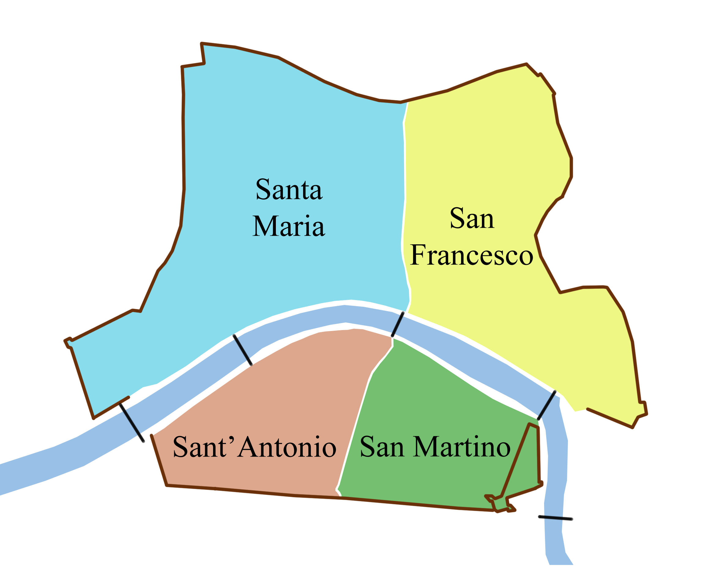 Suddivisione dei quartieri di Pisa dopo l'occupazione fiorentina. Quartiere Sant'Antonio.